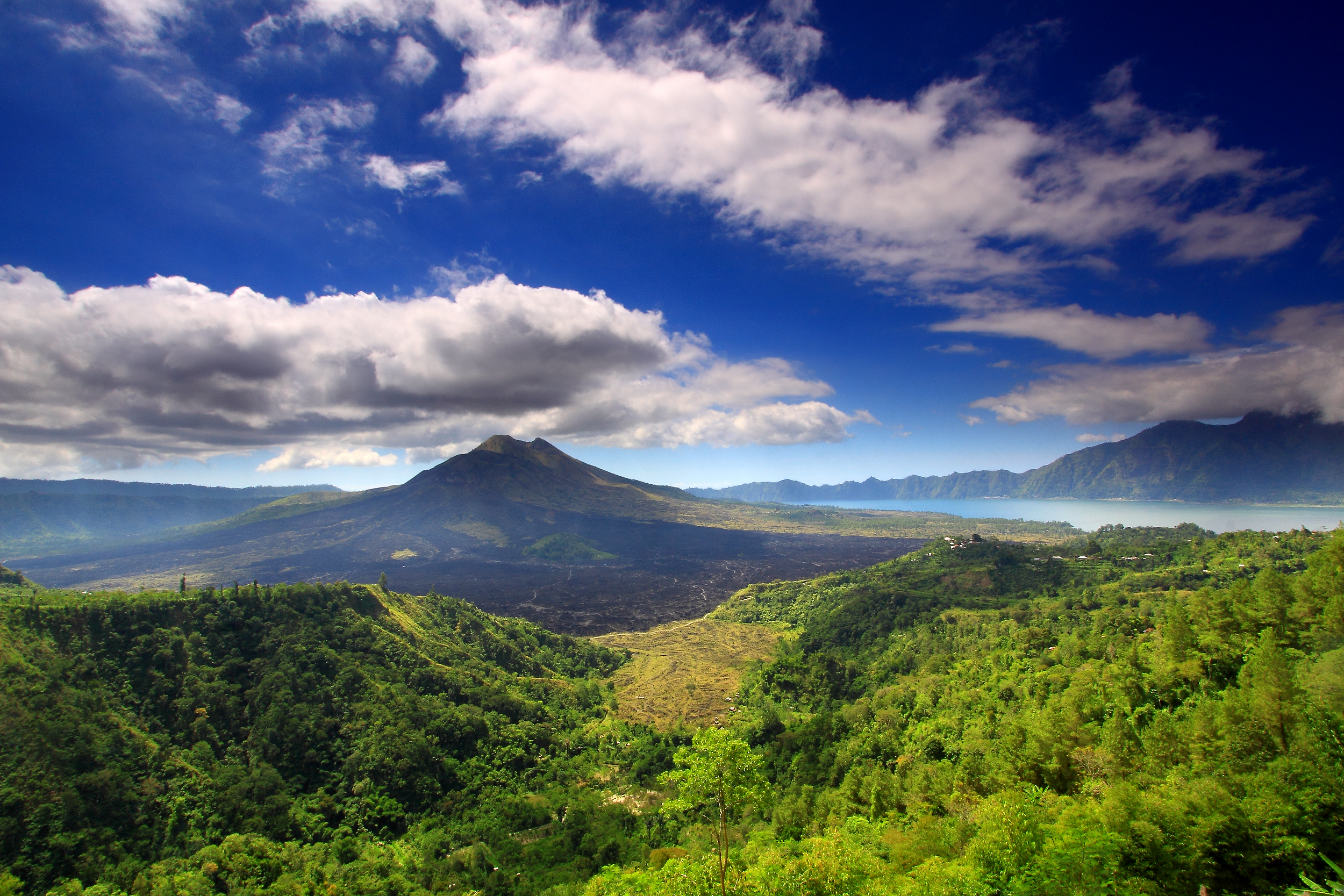 Batur Volcano and Lake, Lesser Sunda Islands, Indonesia